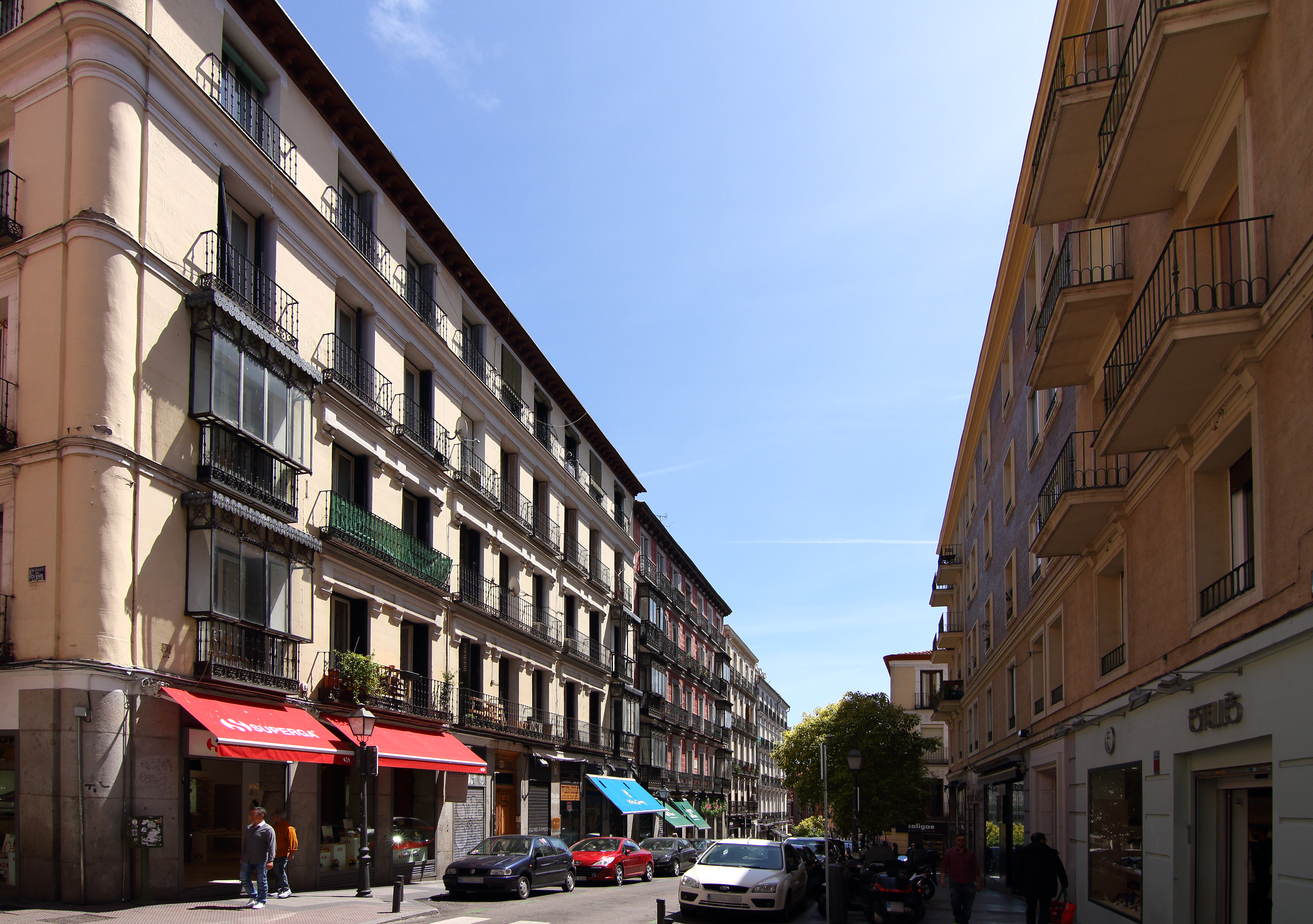 Calle de AugustoFigueroa, desde la calle Pelayo